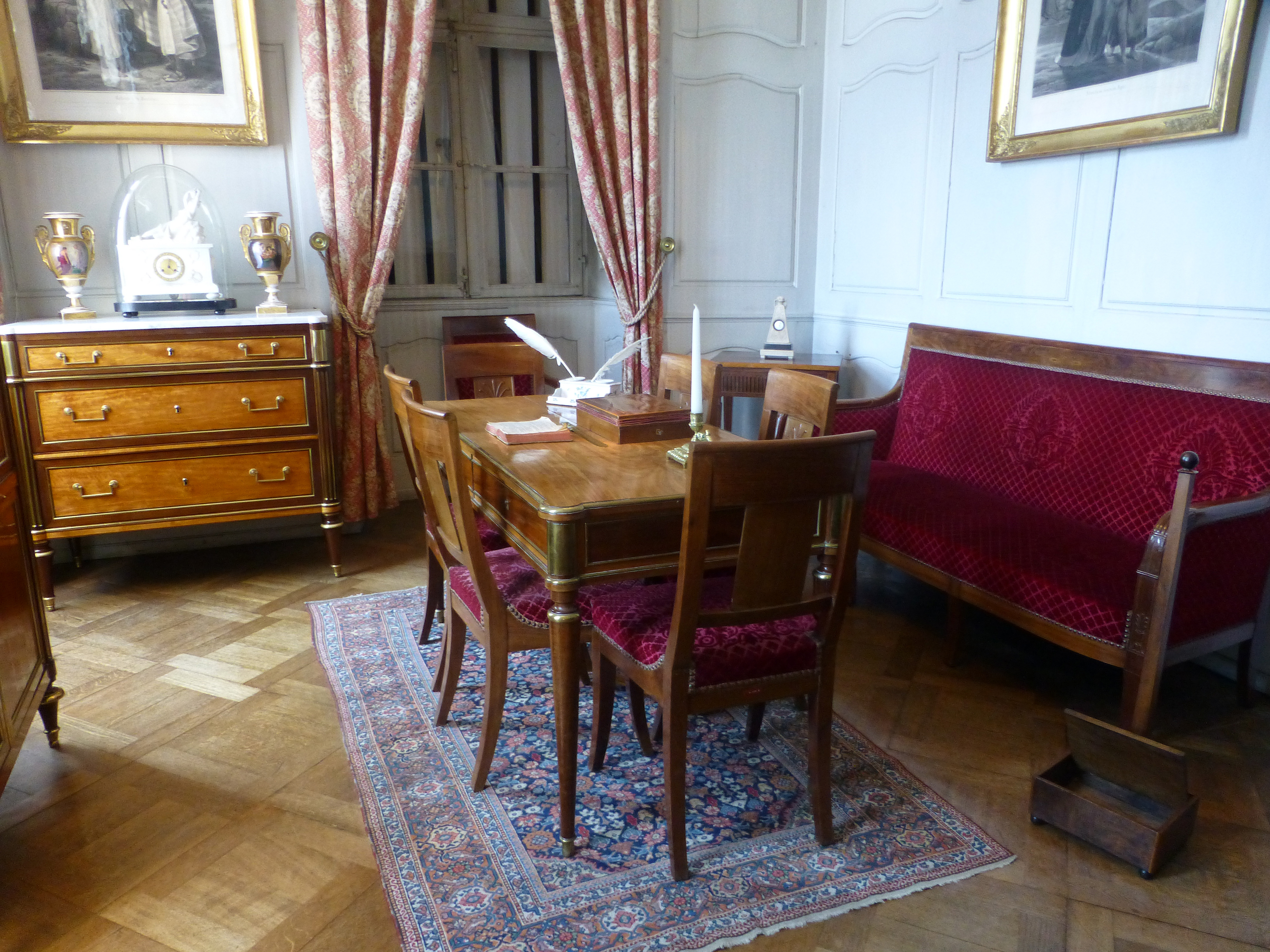 Mobilier bourgeois alsacien au Musée de la Folie Marco à Barr (Bas-Rhin)